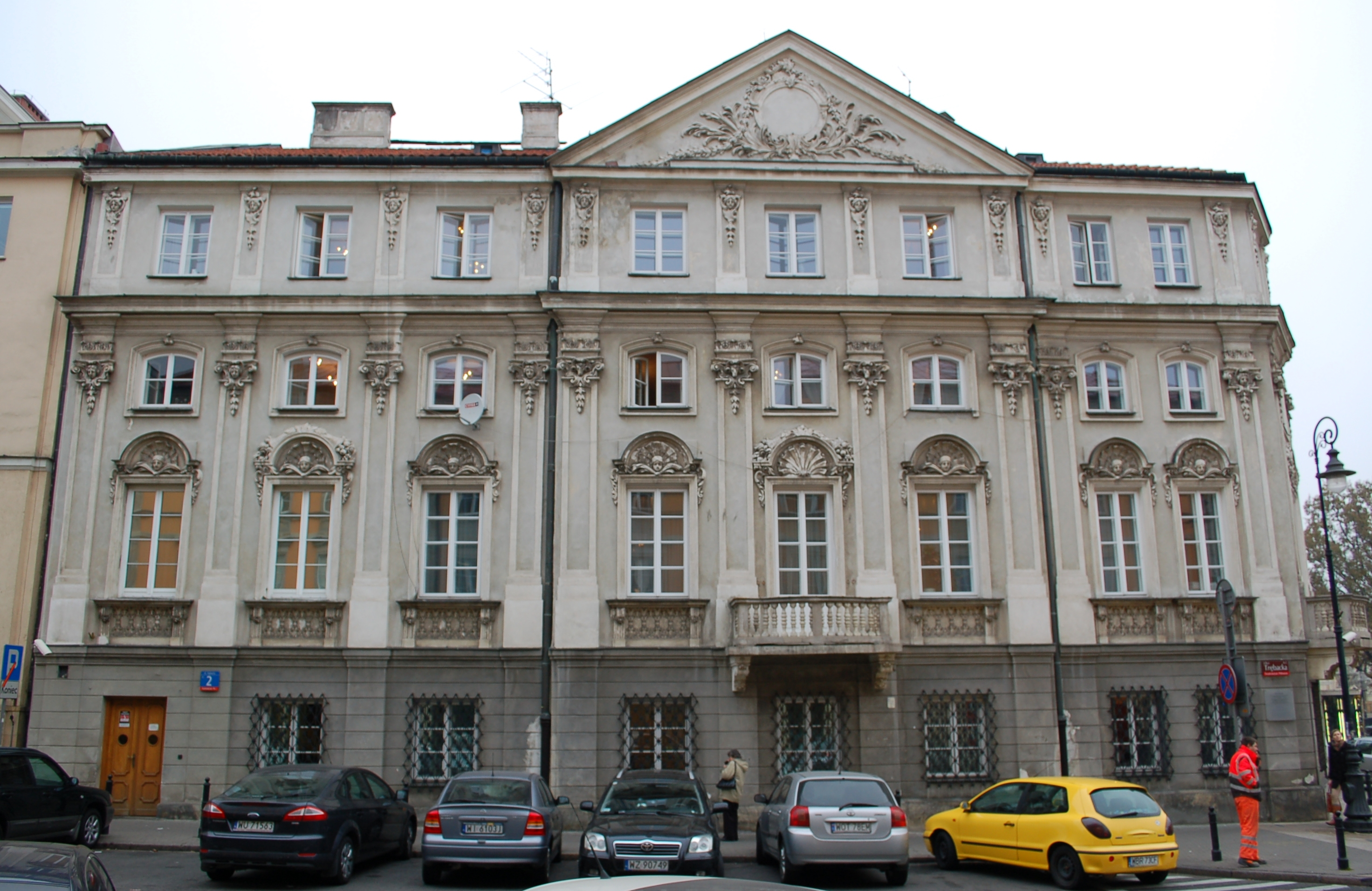 Wessel Palast Warschau